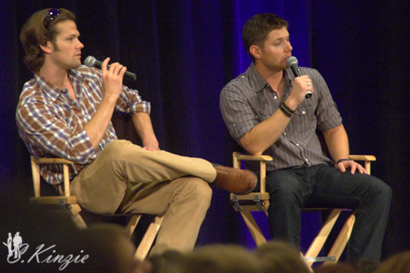 jandj009